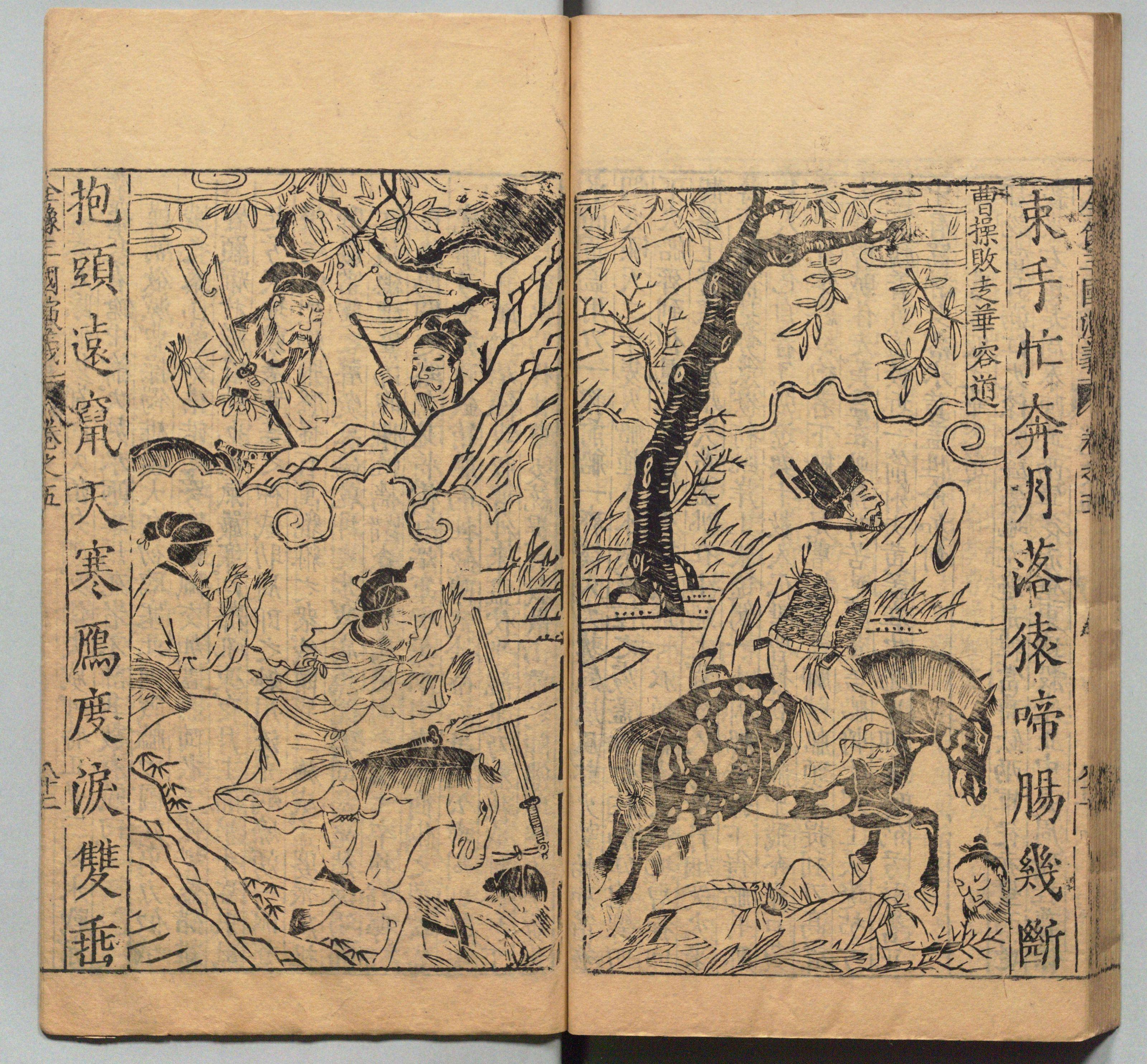 新刊校正古本大字音释三国志通俗演义 明万历十九年书林周曰校刊本